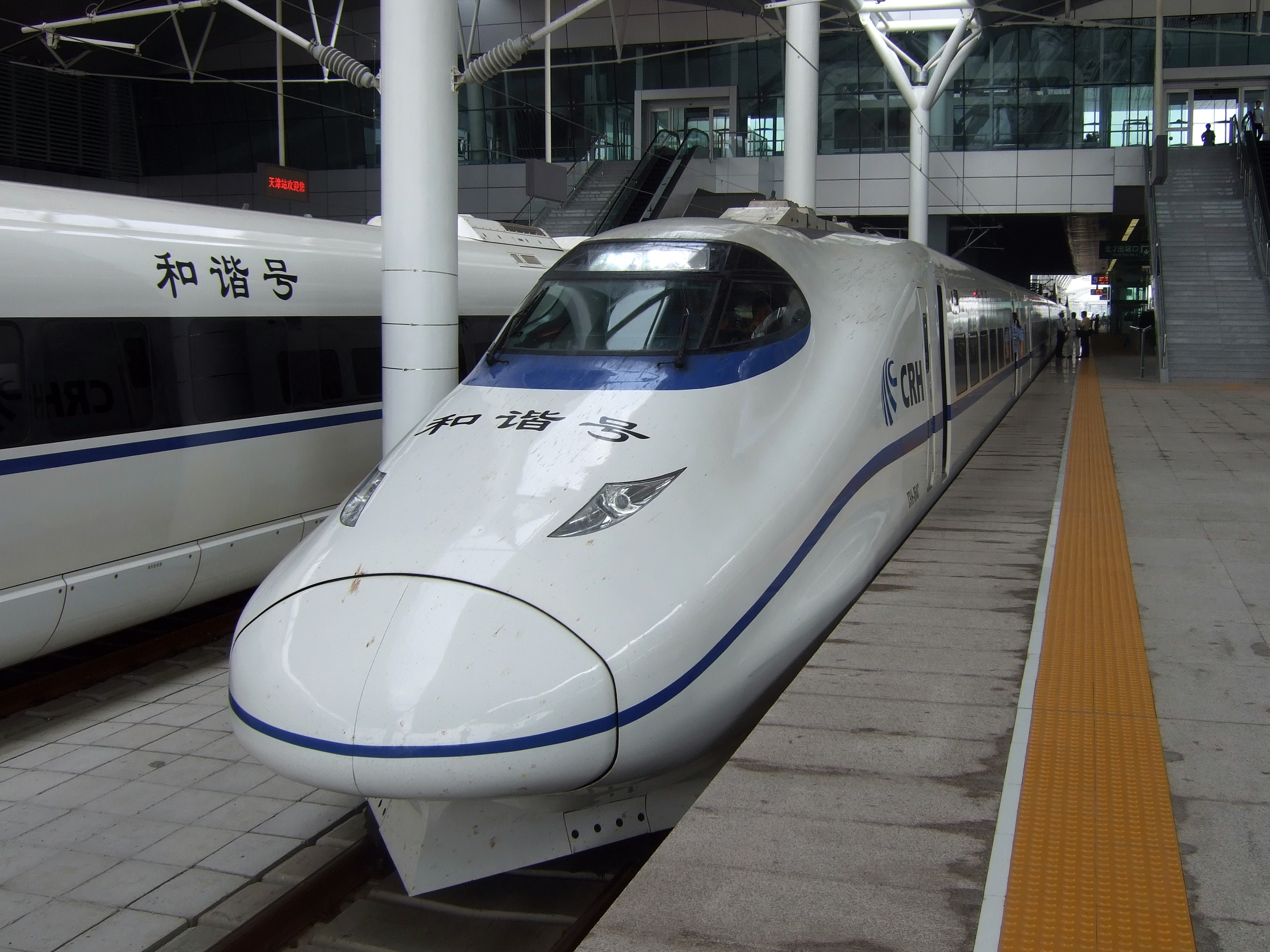 运行于京津城际的CRH2-064C在天津站